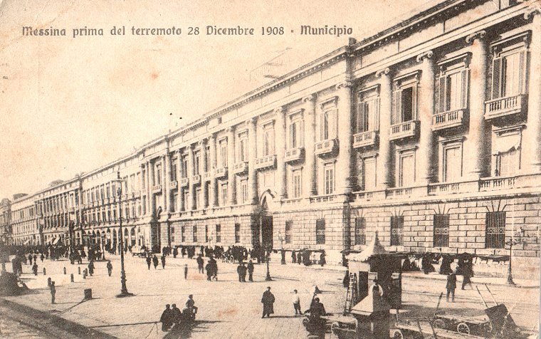 Messina: il vecchio Palazzo Municipale, costruito nel 1820 da Giacomo Minutolì: prospetto su Via Vittorio Emanuele. Fu distrutto da un incendio nel corso del terremoto del 1908.